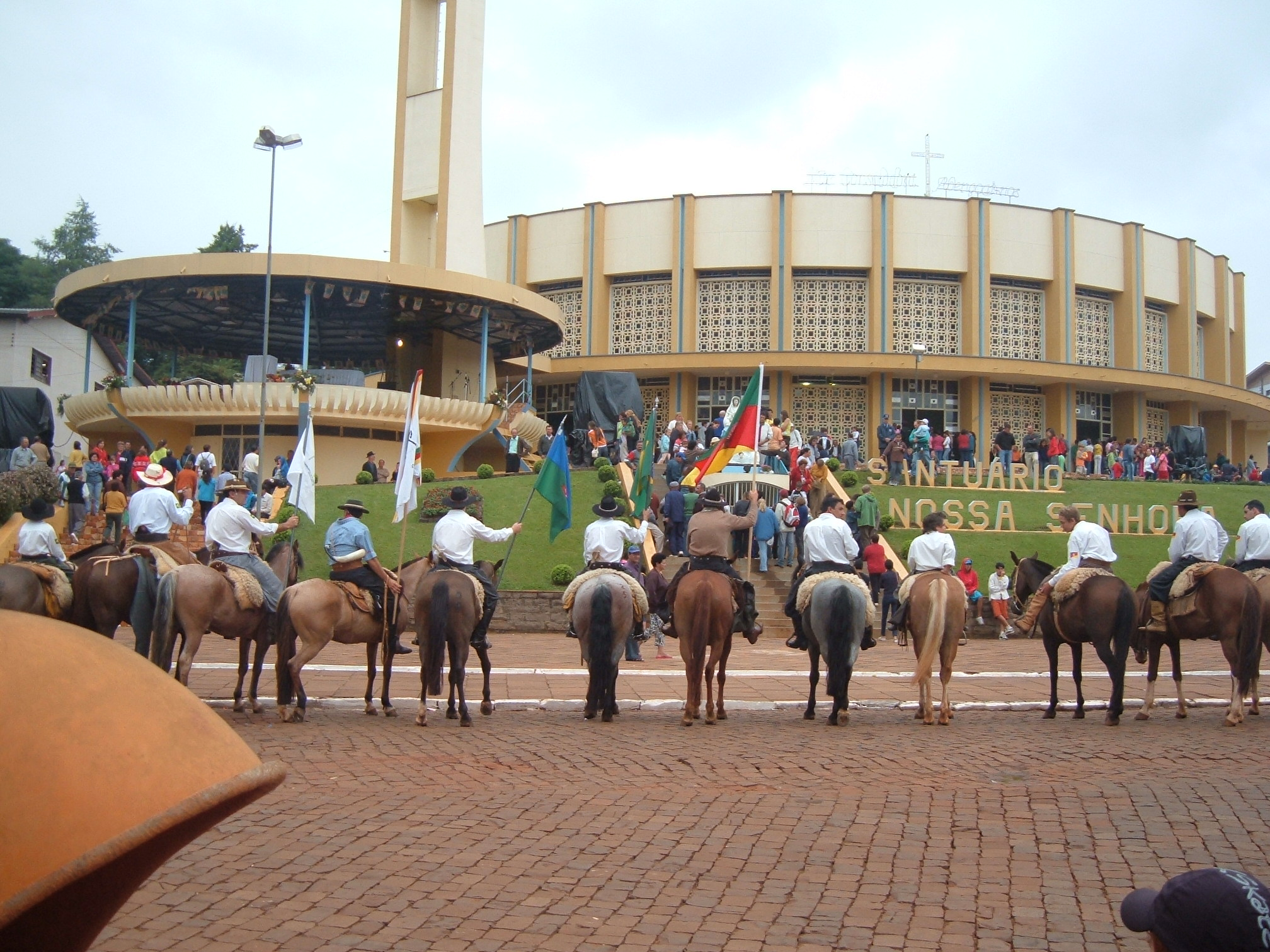 Caveleiros em frente ao Santuário Nossa Senhora em Ibiaçá - Rio Grande do Sul